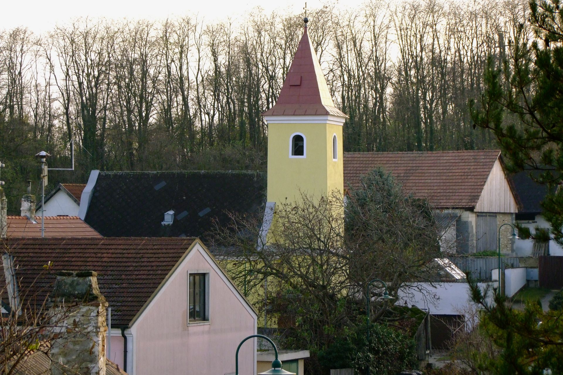 Kath. Filialkirche Vermählung Josef mit Maria